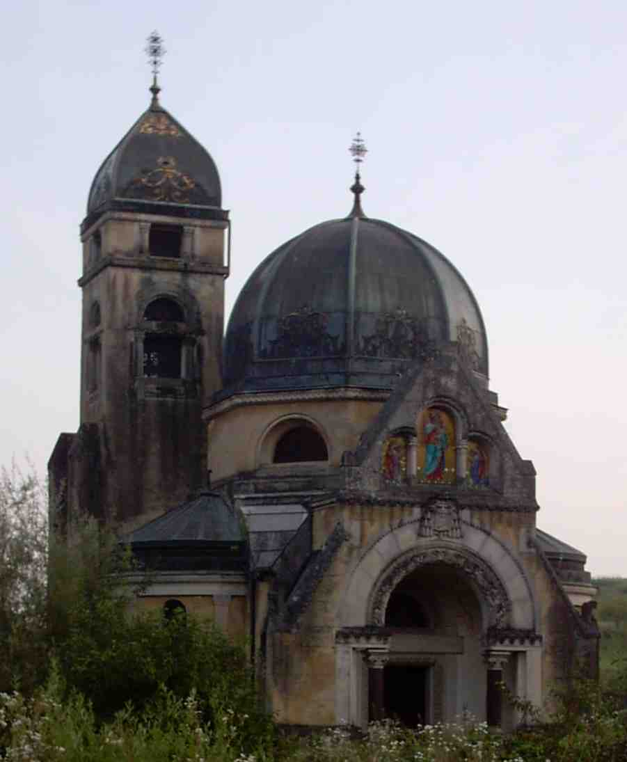 Verkündigungskirche in Pribić, Pfarrei seit 1942